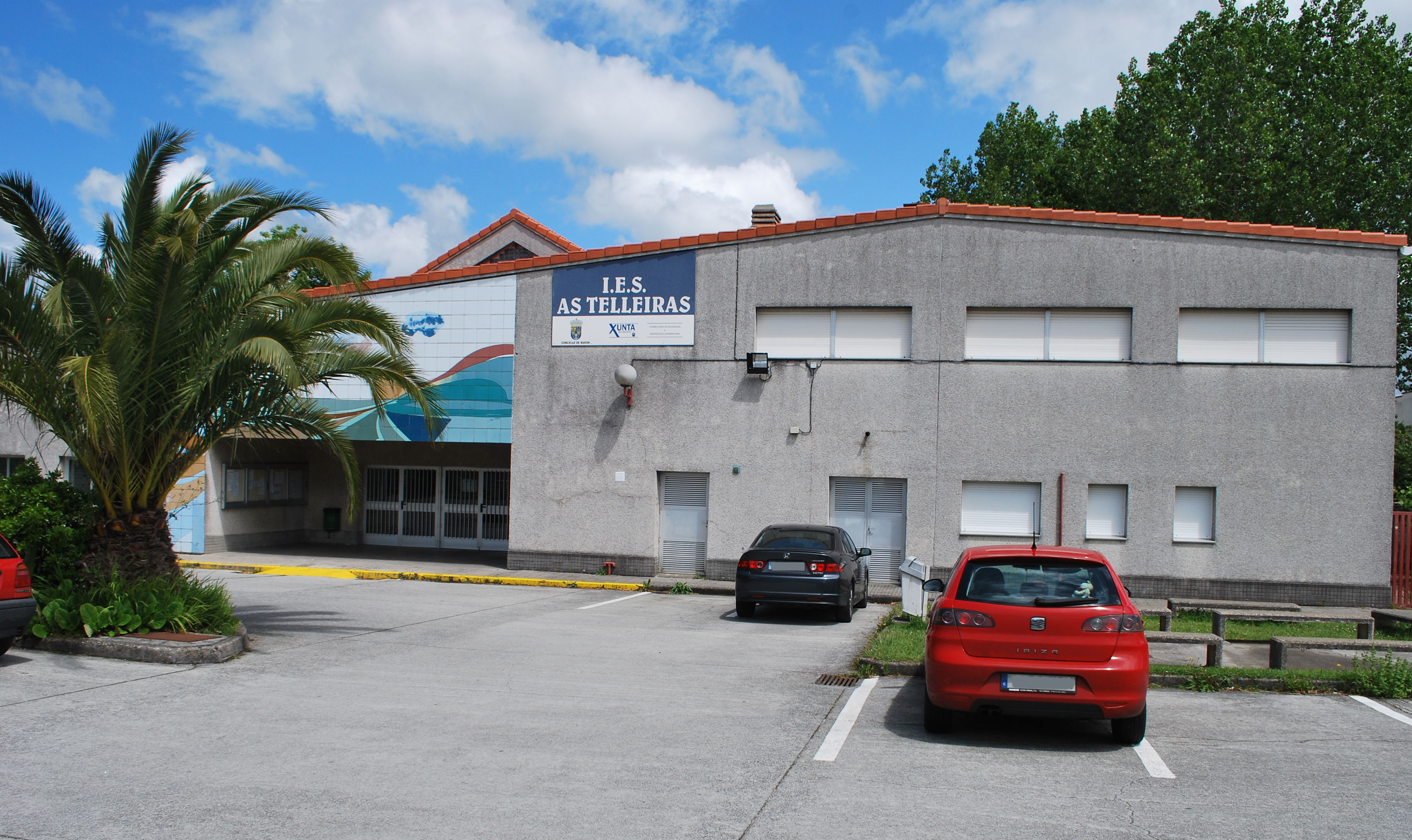 Acceso ao IES As Telleiras de Narón, A Coruña